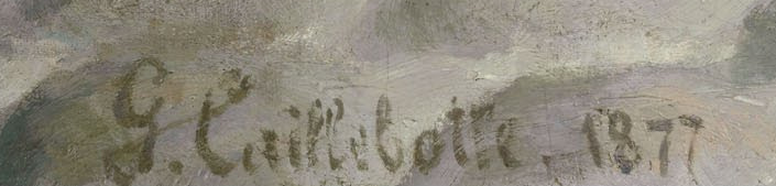 G. Caillebotte. 1877. Signatur des Gemäldes Straße in Paris an einem regnerischen Tag von Gustave Caillebotte